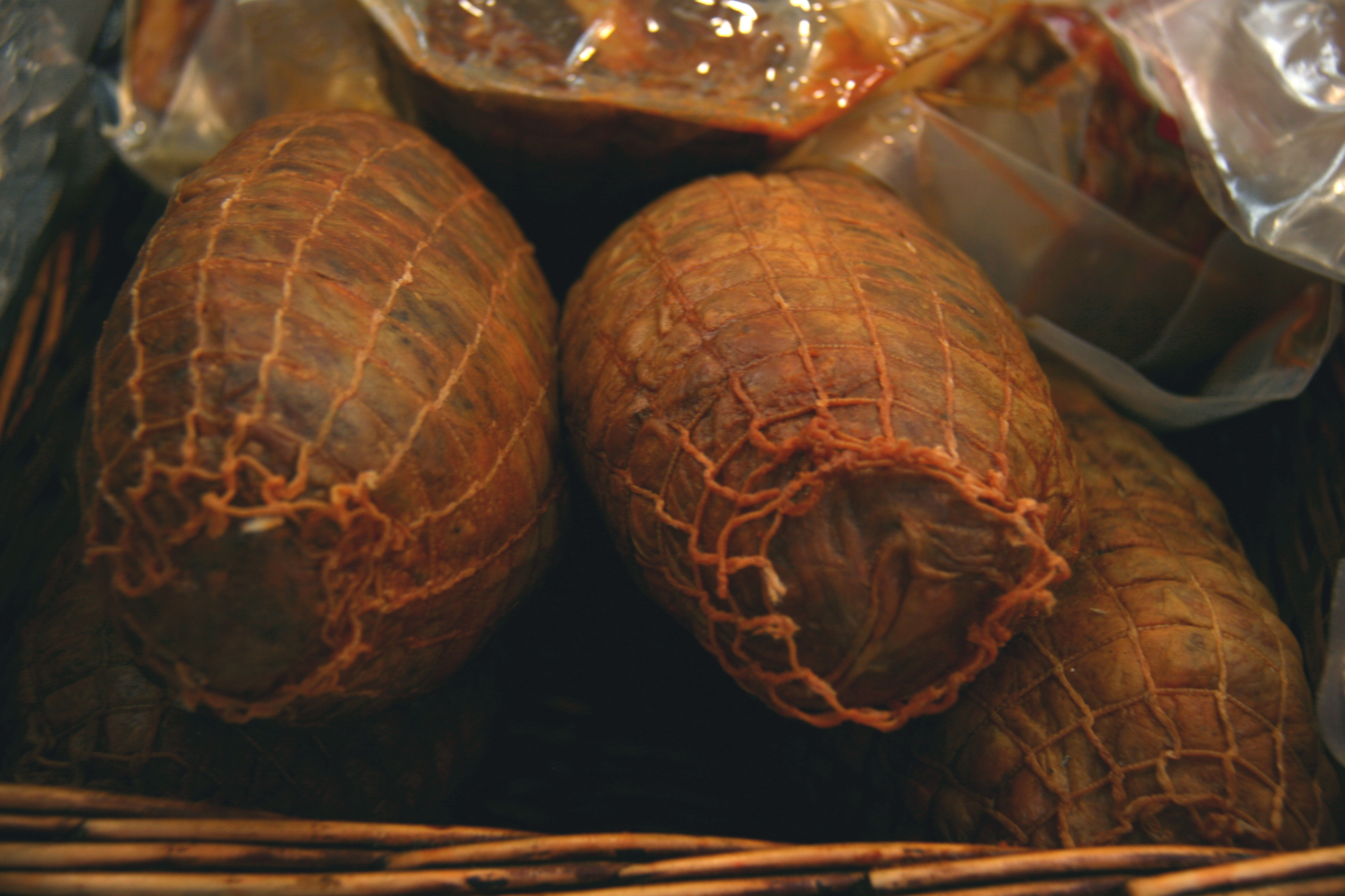 Morcón